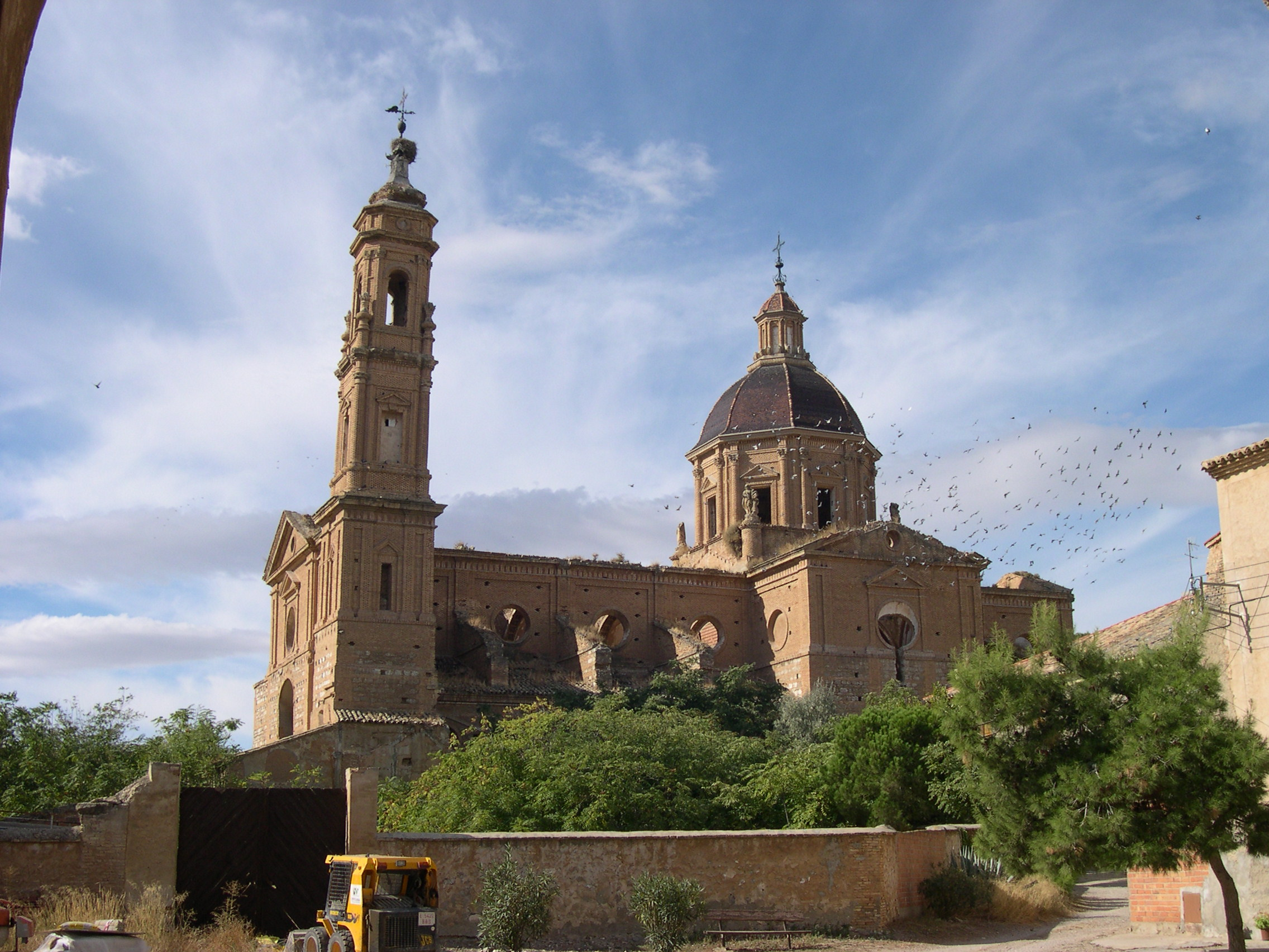 Monasterio de Santa Fe, Zaragoza, Aragón, España/Spain. Desamortizaciones. Iglesia y convento.